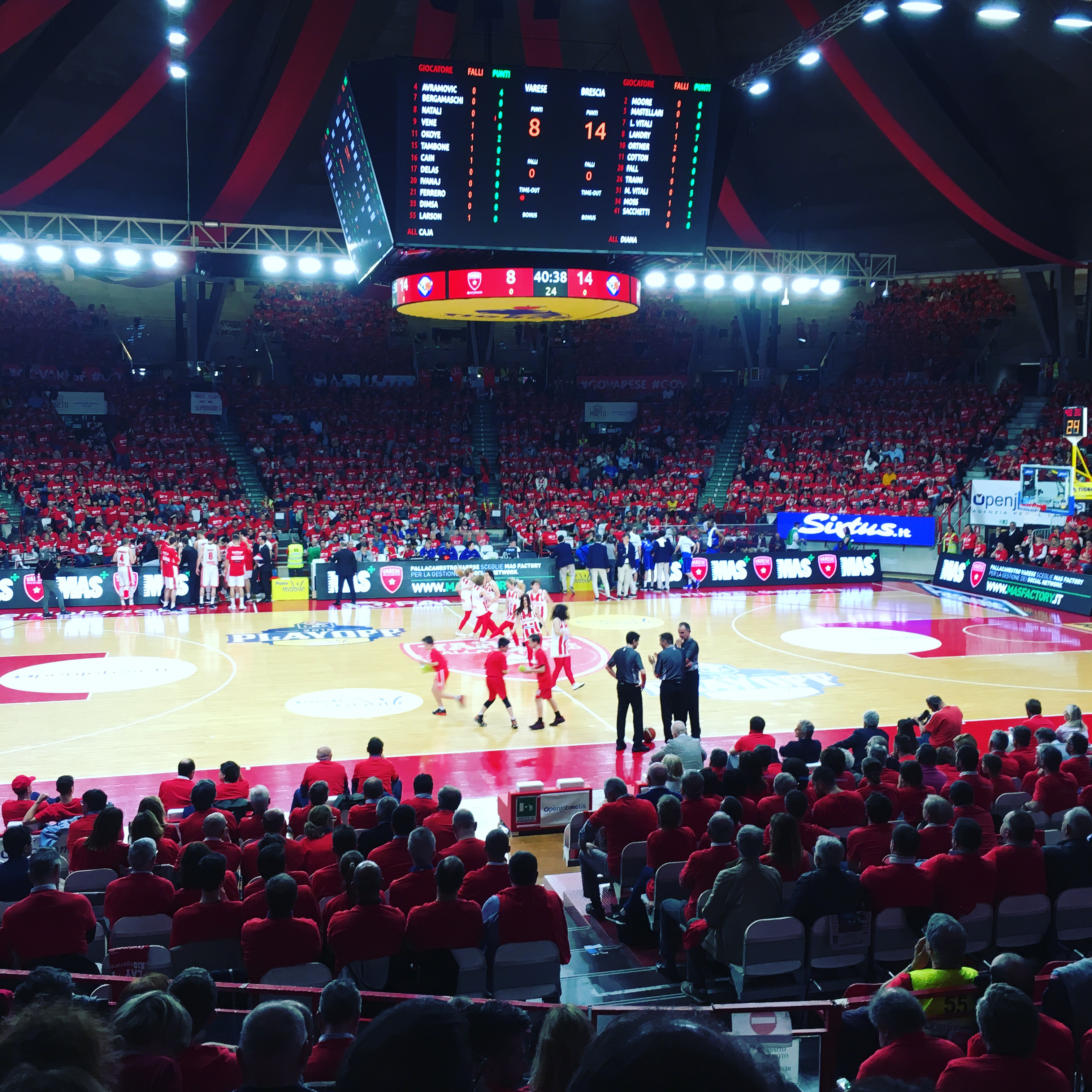 Il PalA2A nel maggio 2018 per i quarti di finale dei playoff tra Pallacanestro Varese e Leonessa Brescia.